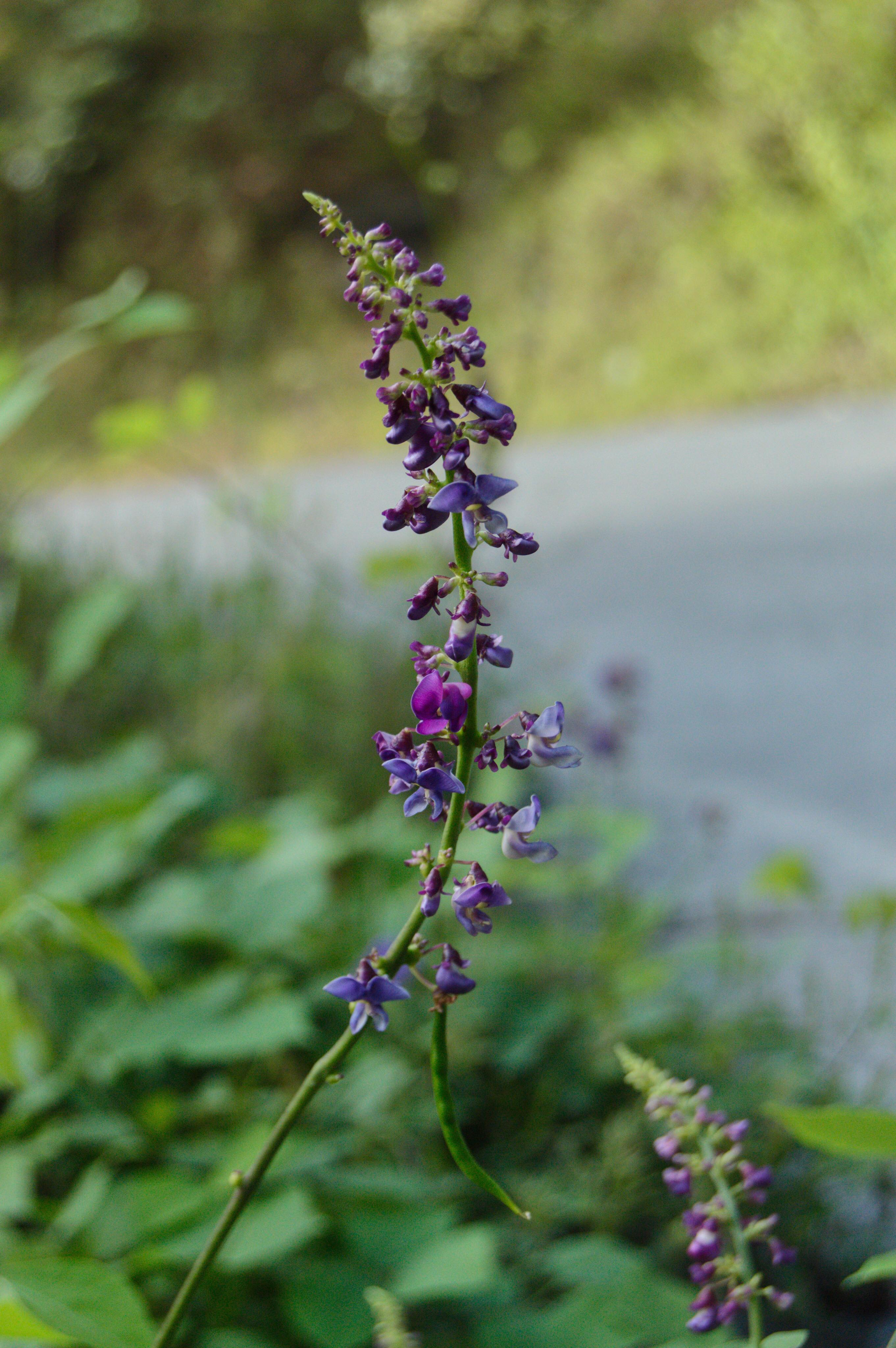 Fotografía tomada en San Pedro Garza García, Nuevo León, México.